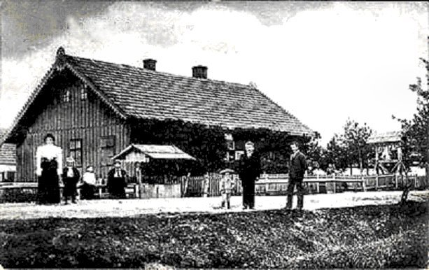 Katharinendorf um 1900, evtl die Schule des Dorfes